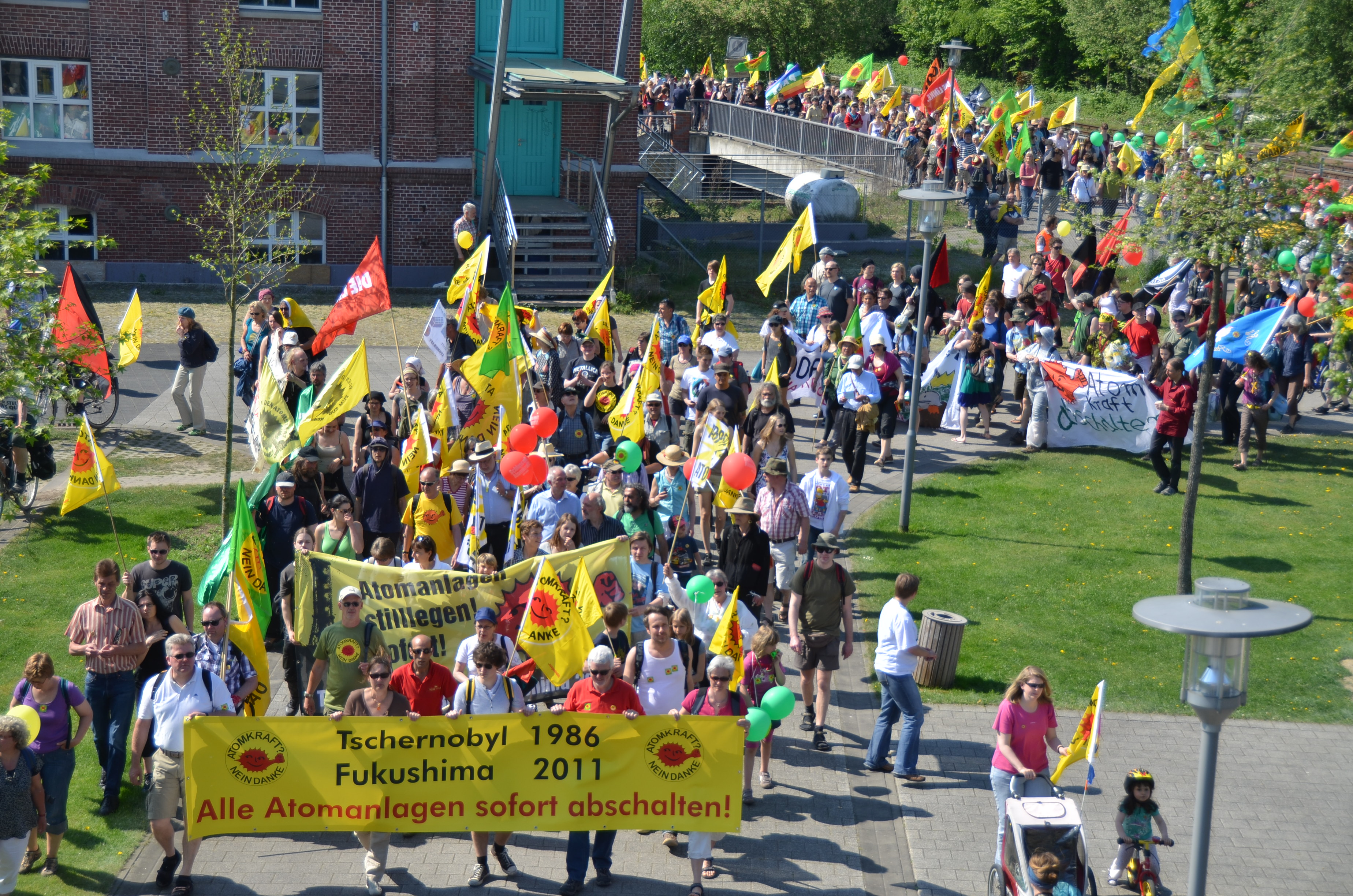 Demonstration „25 Jahre Tschernobyl“ am 25.4.2011 zur Urananreicherungsanlage in Gronau, NRW, Deutschland